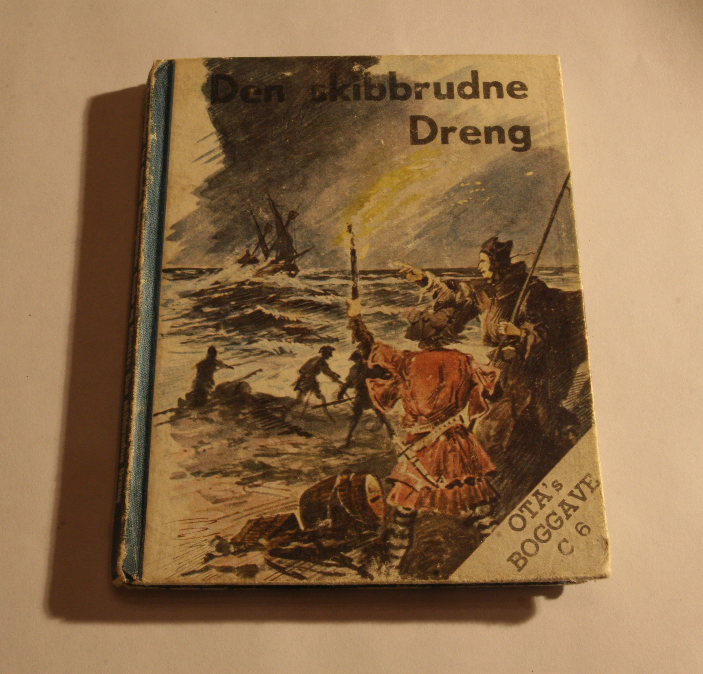 Otabog fra 1942 med historier fra danske herregårde, slotte og klostre